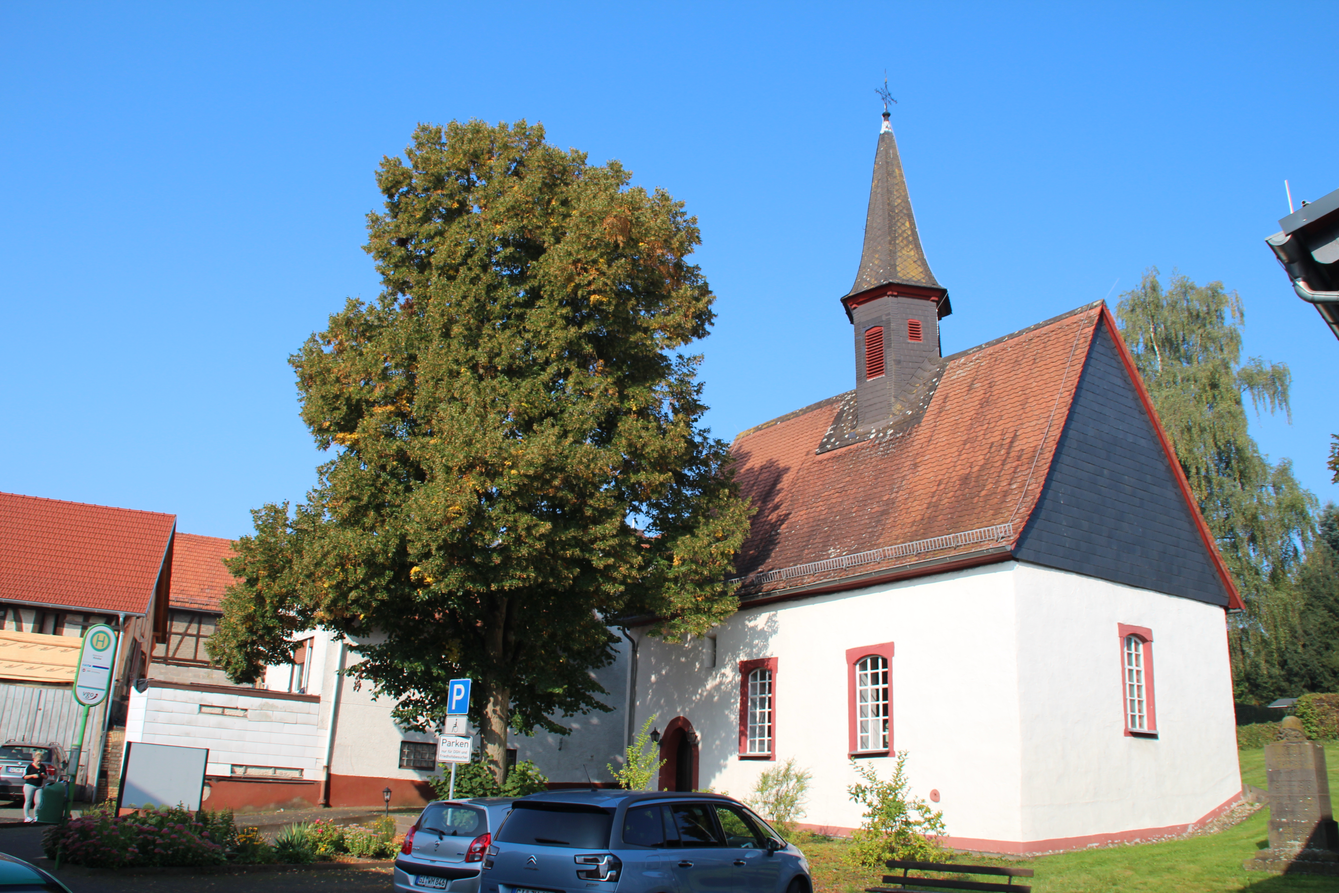 Evangelische Kirche Beltershain, Stadt Grünberg, Landkreis Gießen, Hessen, Deutschland